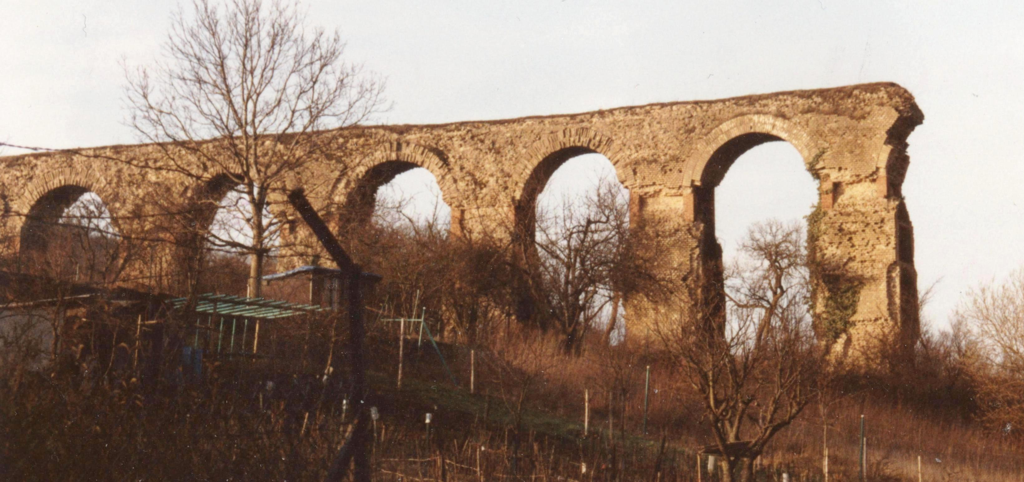 Bréck vun der réimescher Waasserleitung zu Ars-sur-Moselle Kategorie:Brécken